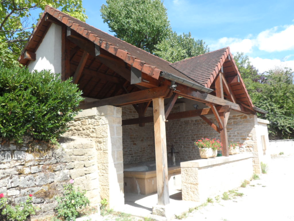 Vue du lavoir adjacent à la mairie de Cesancey ( Jura (39), France)